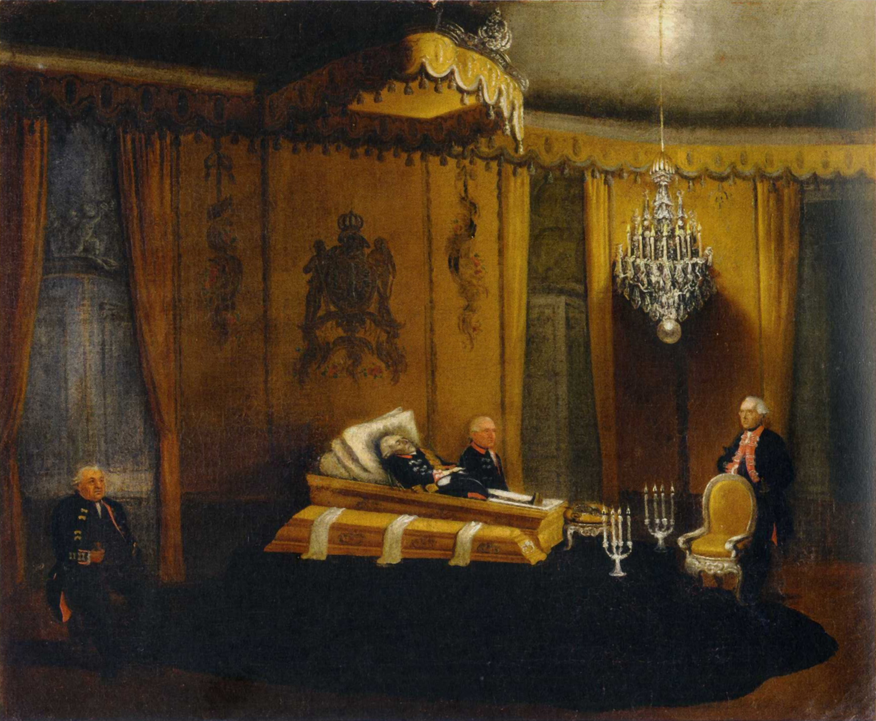 Aufbahrung Friedrichs des Großen im Audienzzimmer des Potsdamer Stadtschlosses. Öl auf Leinwand. Stiftung Preußischer Schlösser und Gärten, GK I 10175. Eigentum des Hauses Hohenzollern, SKH Georg Friedrich Prinz von Preußen